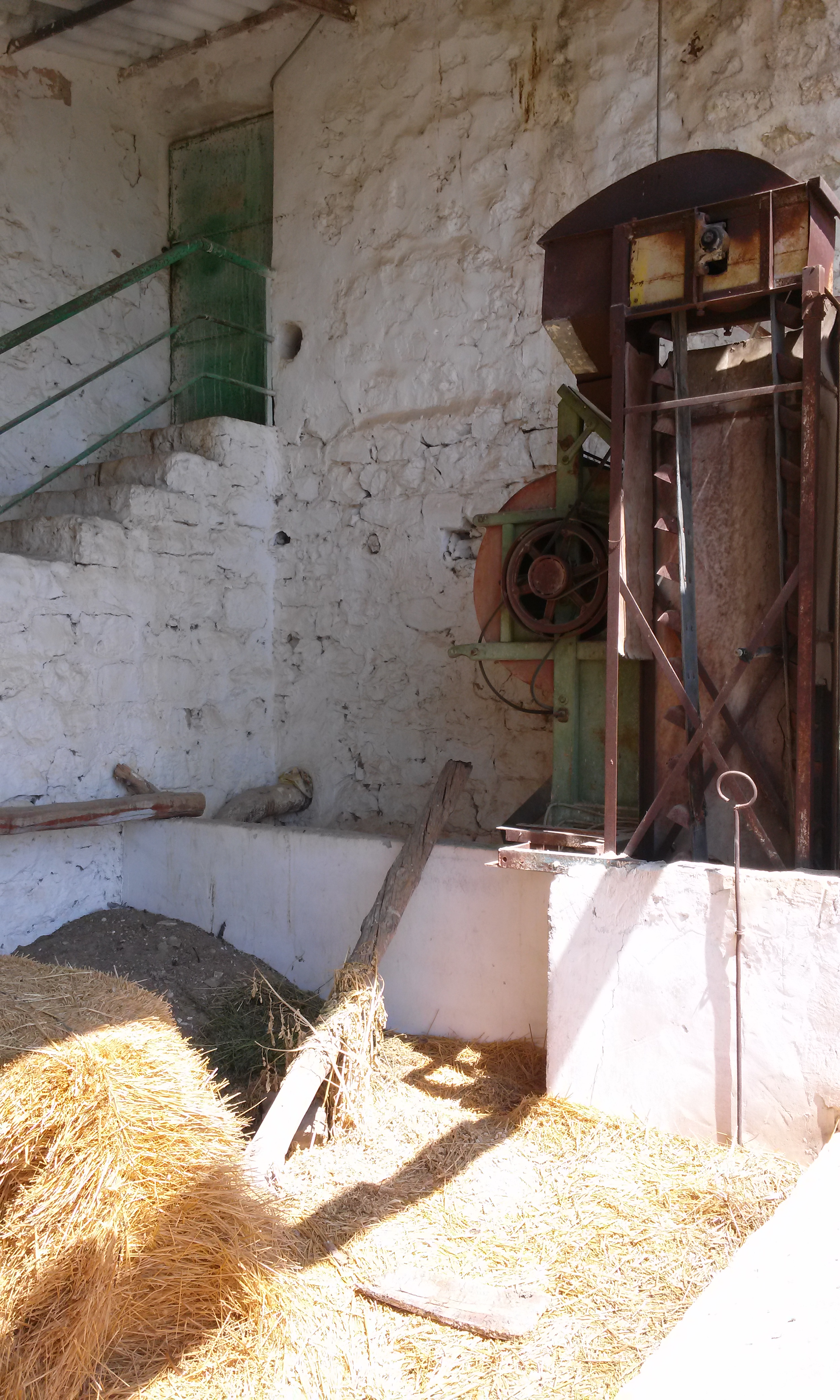 Antigua empacadora, junto a la nave de ganado.